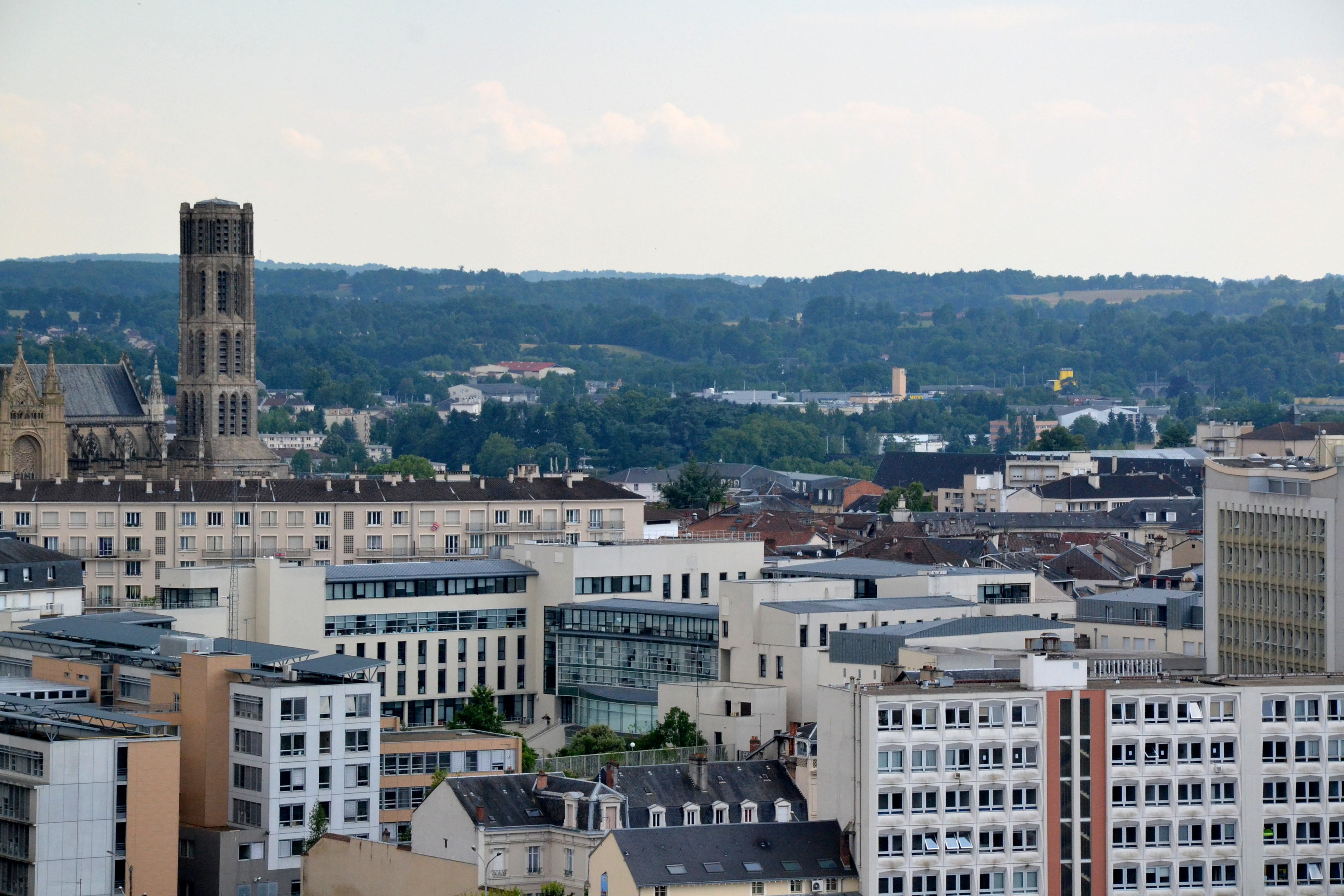 Vue sur la cathédrale Saint-Etienne de Limoges depuis le campanile de la gare.